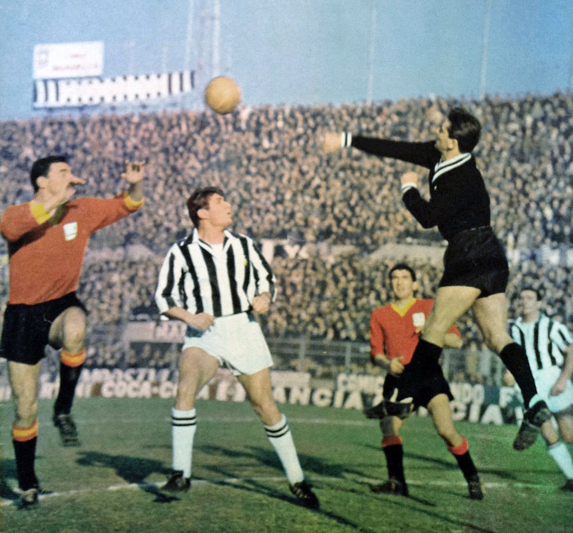 Torino, stadio Comunale, 24 gennaio 1965. Il portiere bianconero Roberto Anzolin sventa un attacco giallorosso nella sfida Juventus – Messina (1-0) valevole per la 18ª giornata del campionato italiano di Serie A 1964-65.